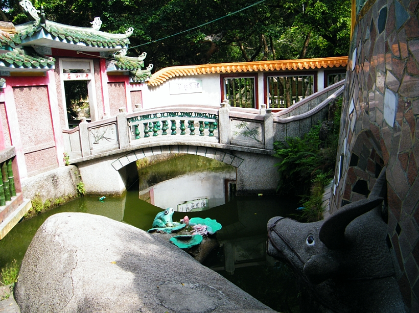 青云岩 祖师公 牛渚西江水景